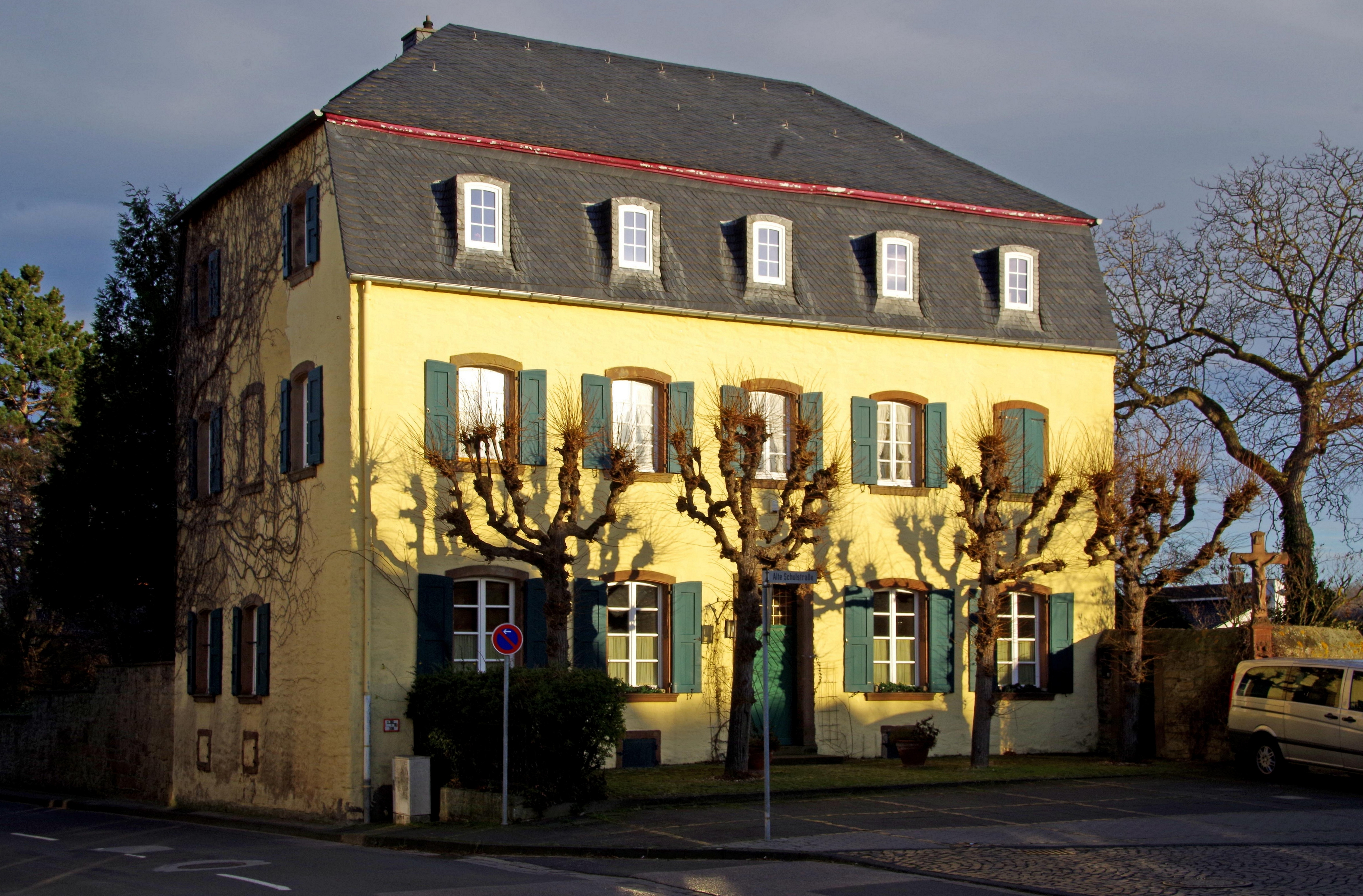 Embken, Ehem. Alte Post